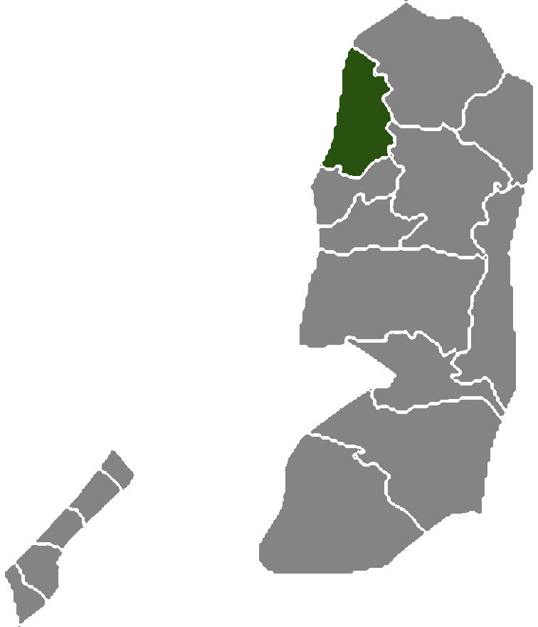 Palestine governorate Toulkarem